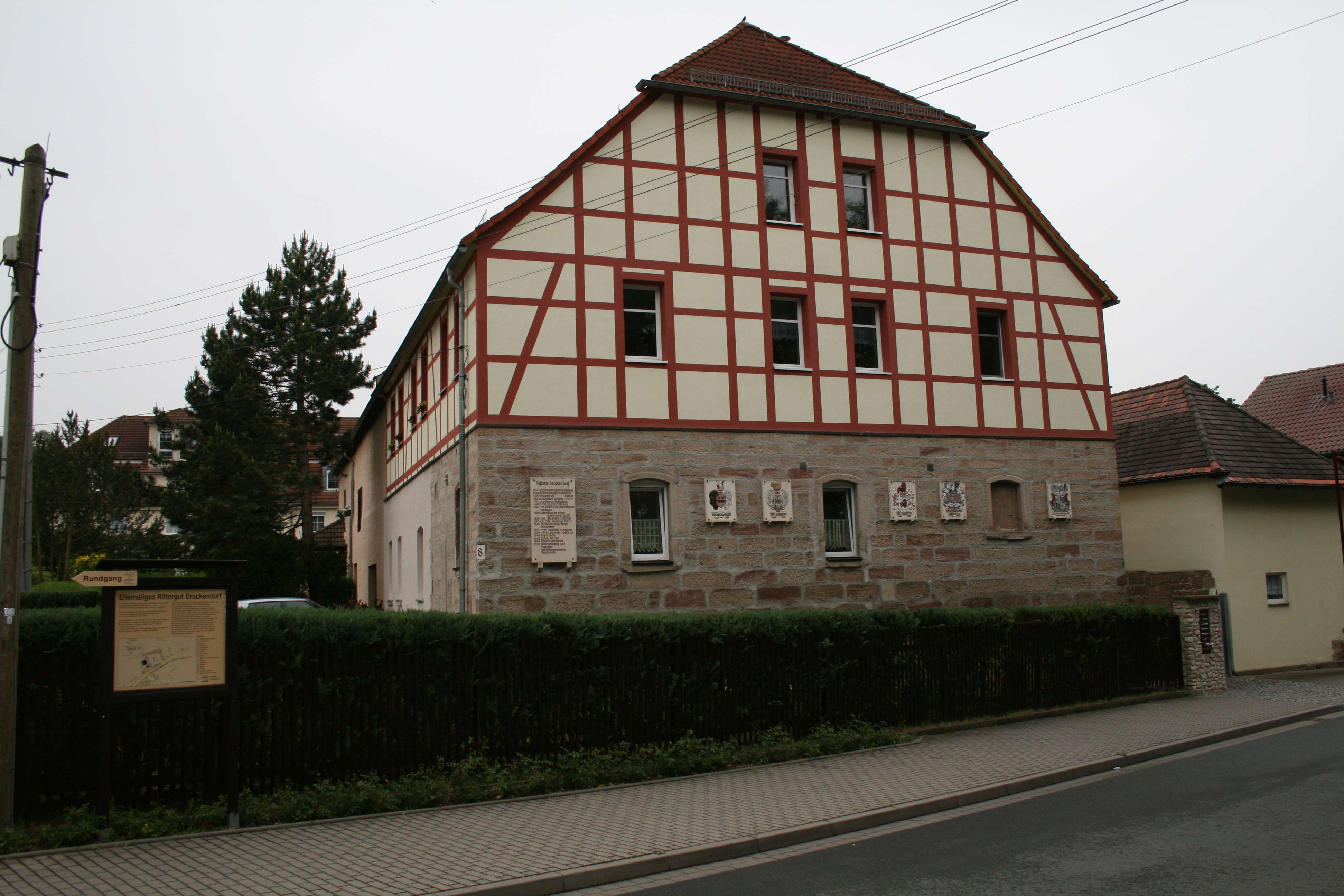 Ehemaliges Rittergut Drackendorf, Jena